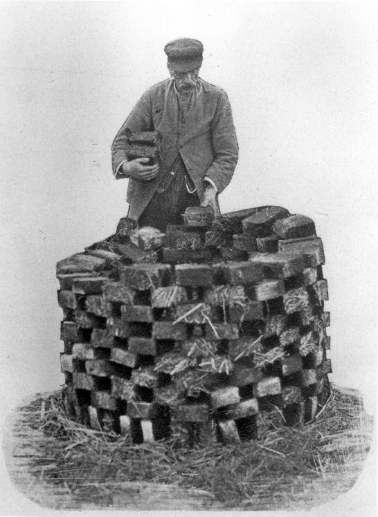 Spaarnestad Photo, SFA001020747 Een man poseert bij een stapel te drogen staande turfblokken. Plaats en datum onbekend. Drying peat. Place and date unknown. Possibly 1920s Voor meer informatie en voor meer foto’s uit de collectie van Spaarnestad Photo, bezoek onze Beeldbank: U kunt ons helpen onze kennis van de fotocollecties te verrijken door tags en commentaren toe te voegen. Herkent u mensen of locaties of heeft u een bijzonder verhaal te vertellen bij één van de foto’s, laat dan een reactie achter (als u ingelogd bent bij Flickr) of stuur een mailtje naar